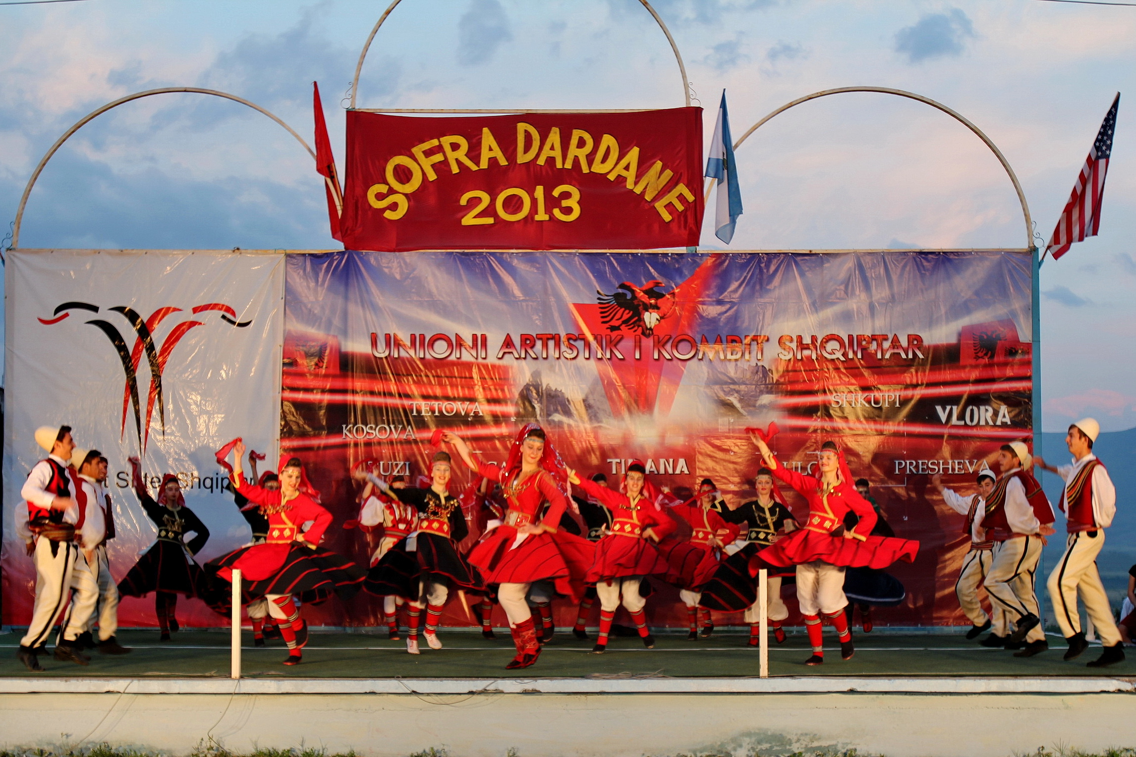 Sofra Dardane - Bajram Curr 01